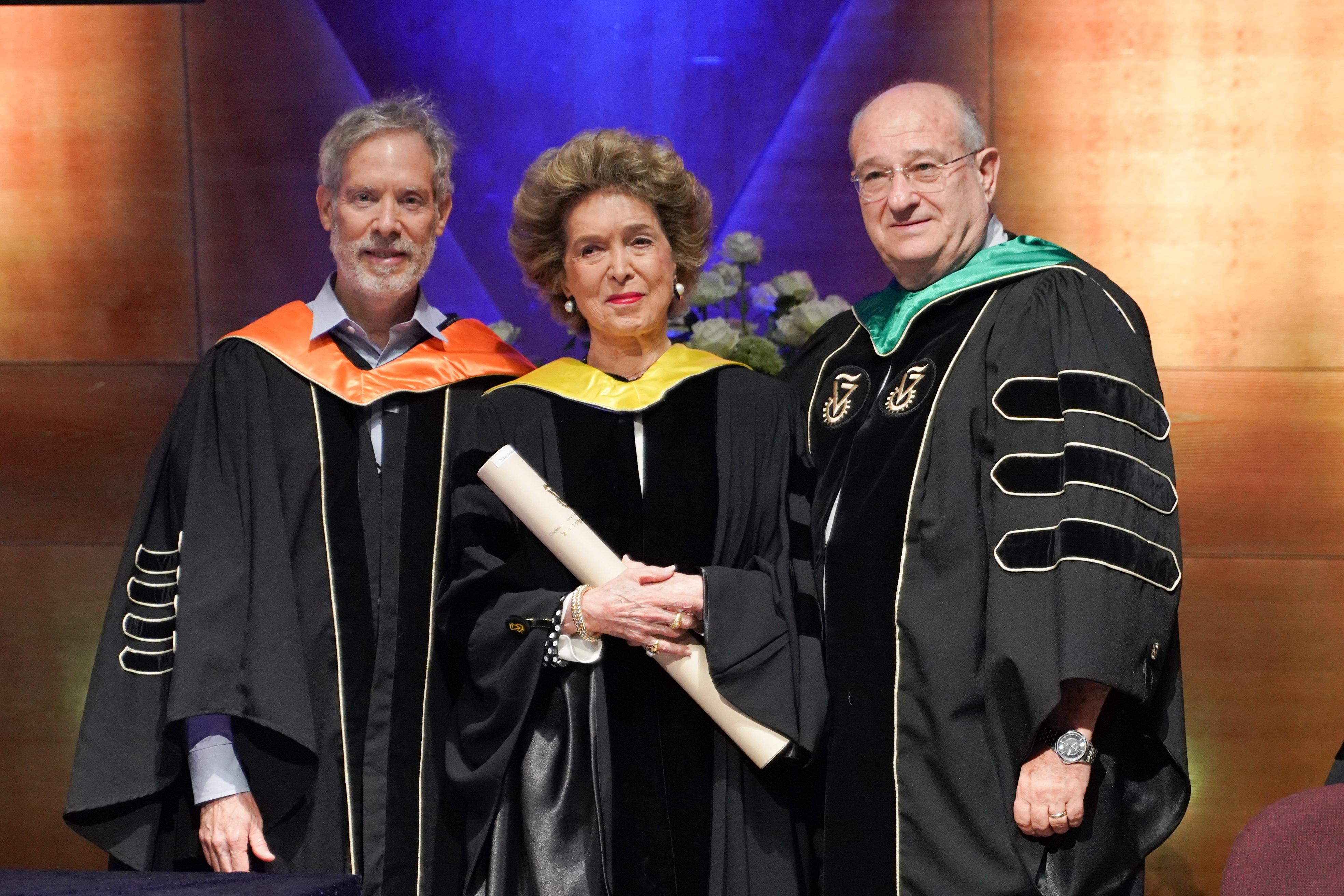 הענקת דוקטורט לשם כבוד מהטכניון לנינה ווינר - צילום ניצן זוהר